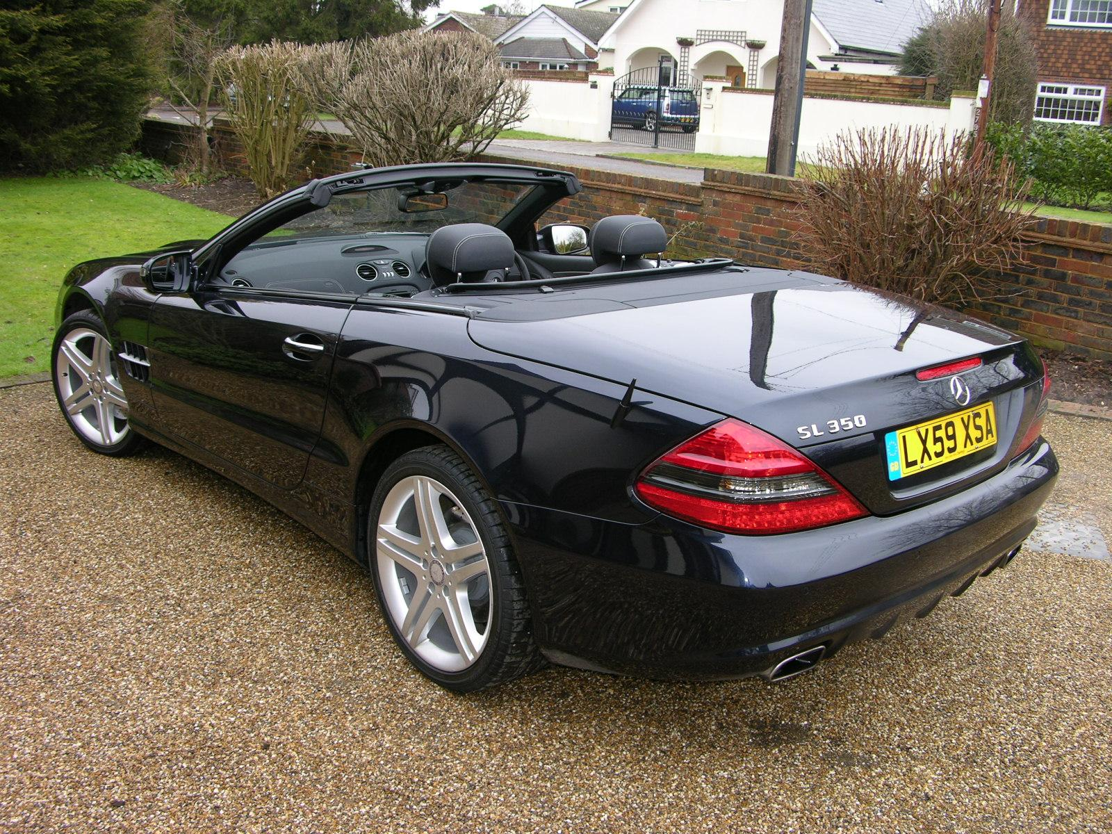 2009 Mercedes Benz SL350